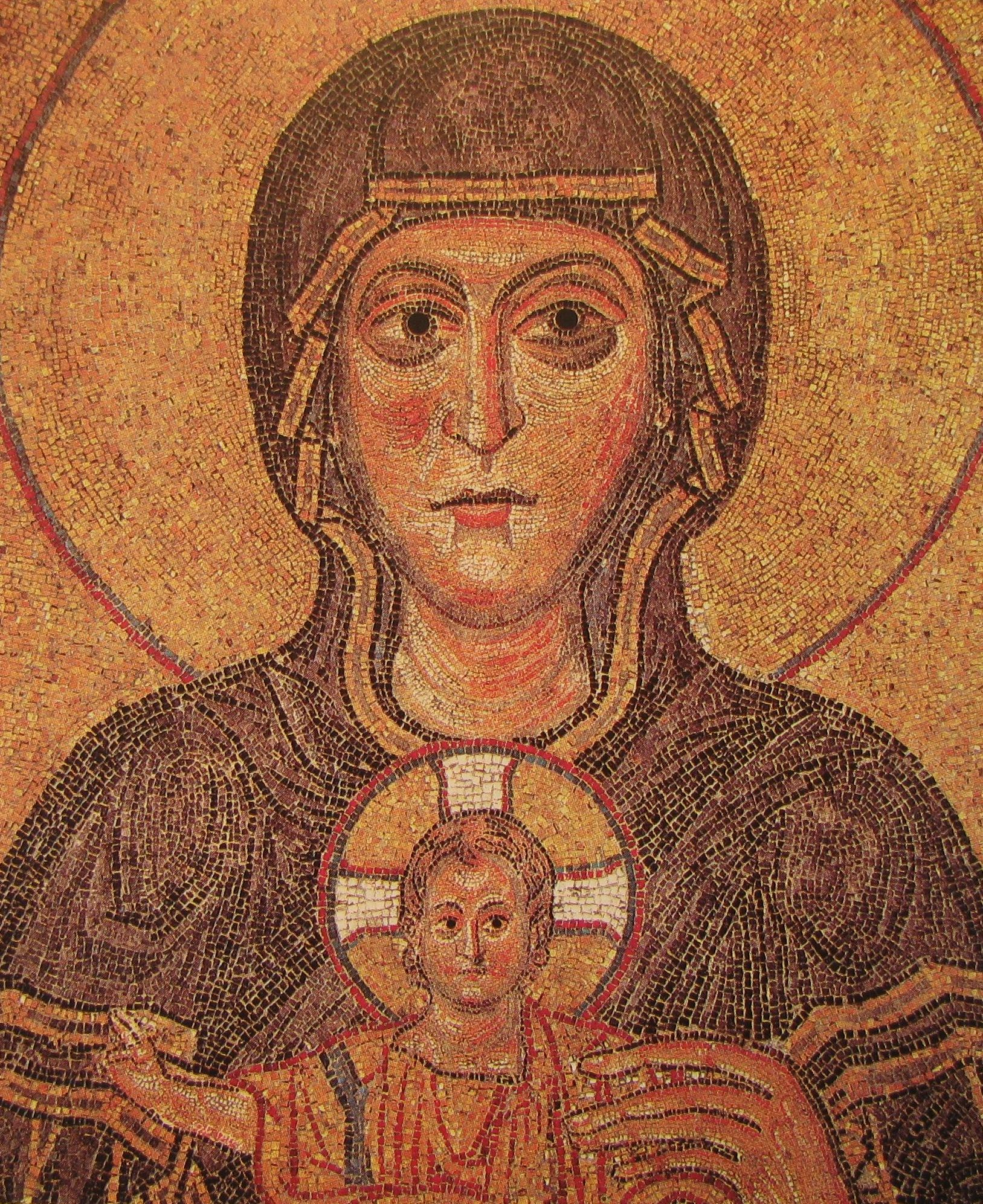 Одигитрия (деталь мозаики апсиды)